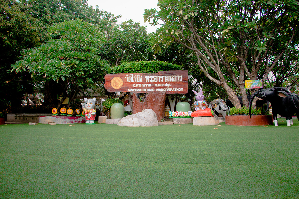 สวนหย่อมบริเวณหน้าวัดไร่ขิง พระอารามหลวง